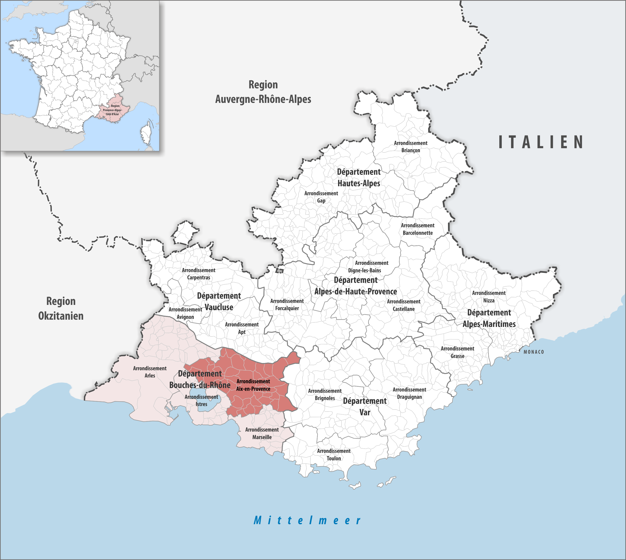 Lage des Arrondissements Aix-en-Provence